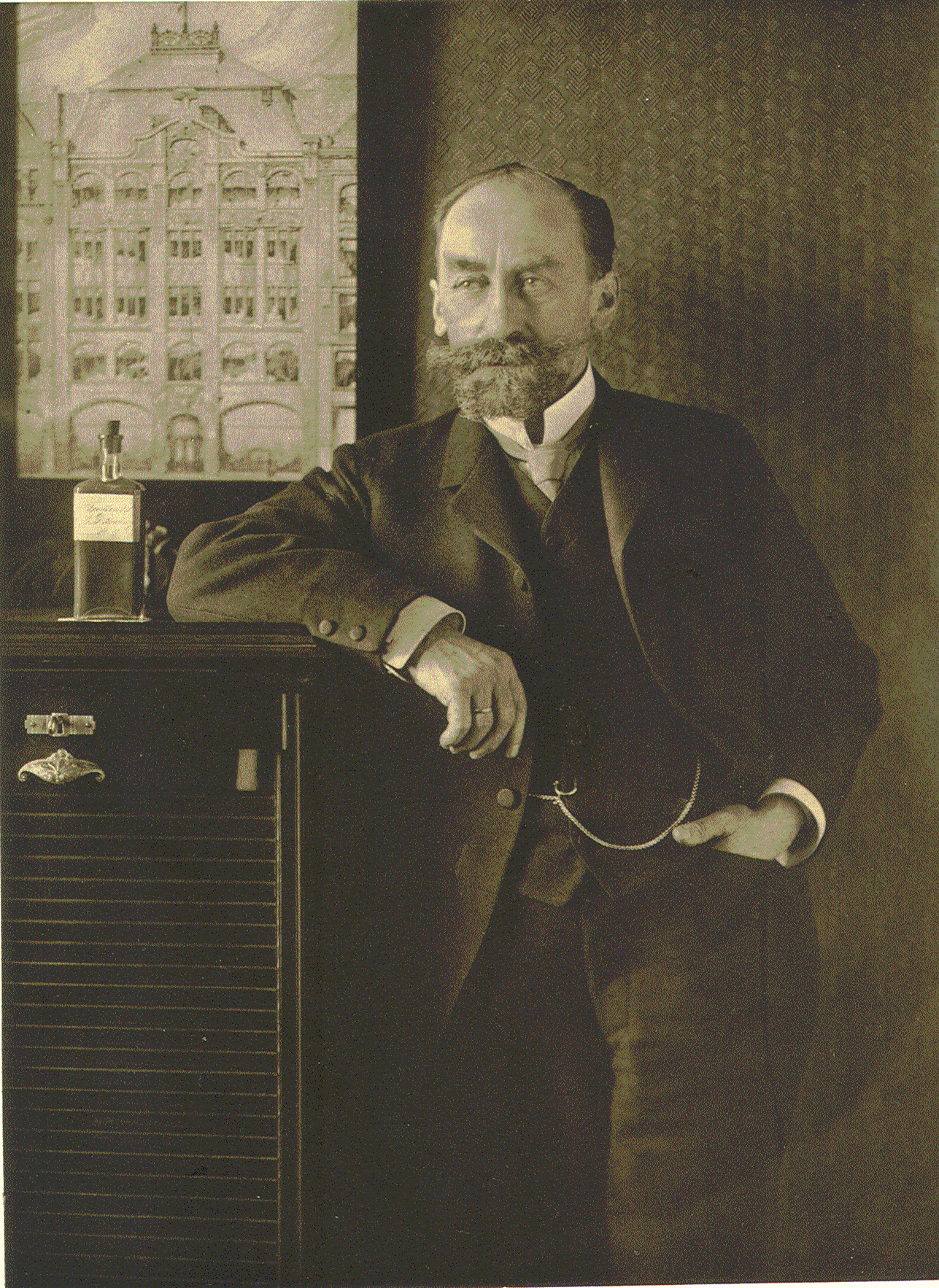 Max Albrecht (1851-1925), Industrieller und Abgeordneter der Hamburgischen Bürgerschaft